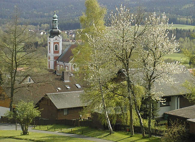 Neualbenreuth Fotograf: Walter J. Pilsak, Waldsassen Copyright Status: GNU Freie Dokumentationslizenz